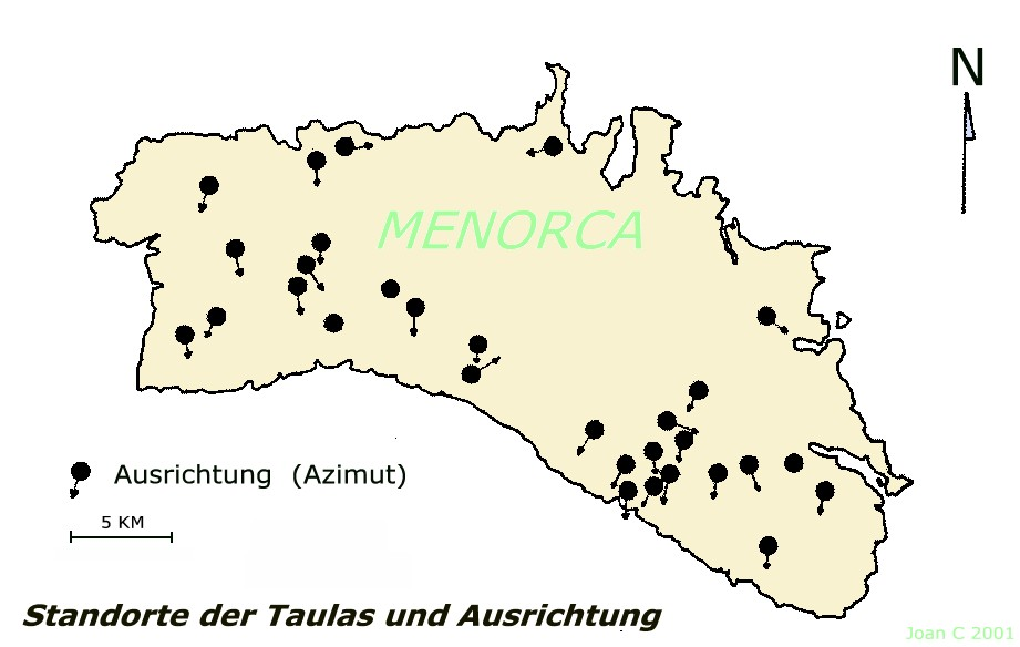 DISTRIBUCIÓN DE LAS TAULAS MENORQUINAS